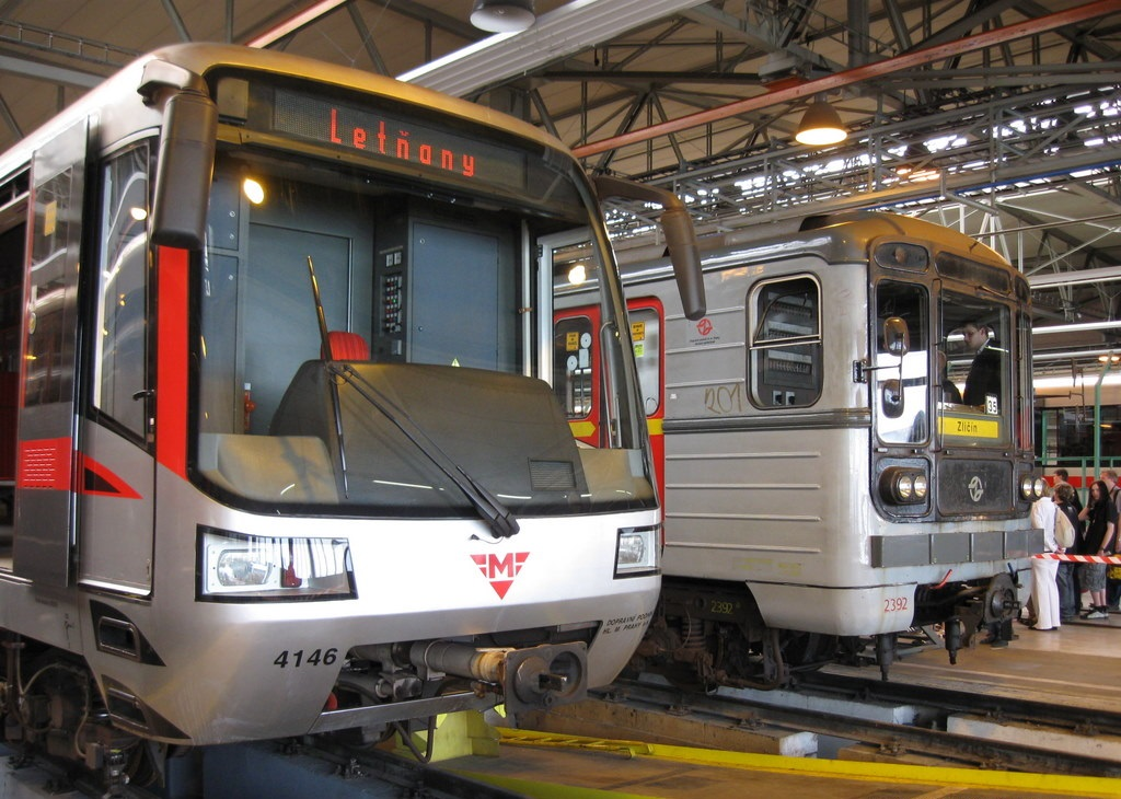 35 let pražského metra - Den otevřených dveří v depu Kačerov